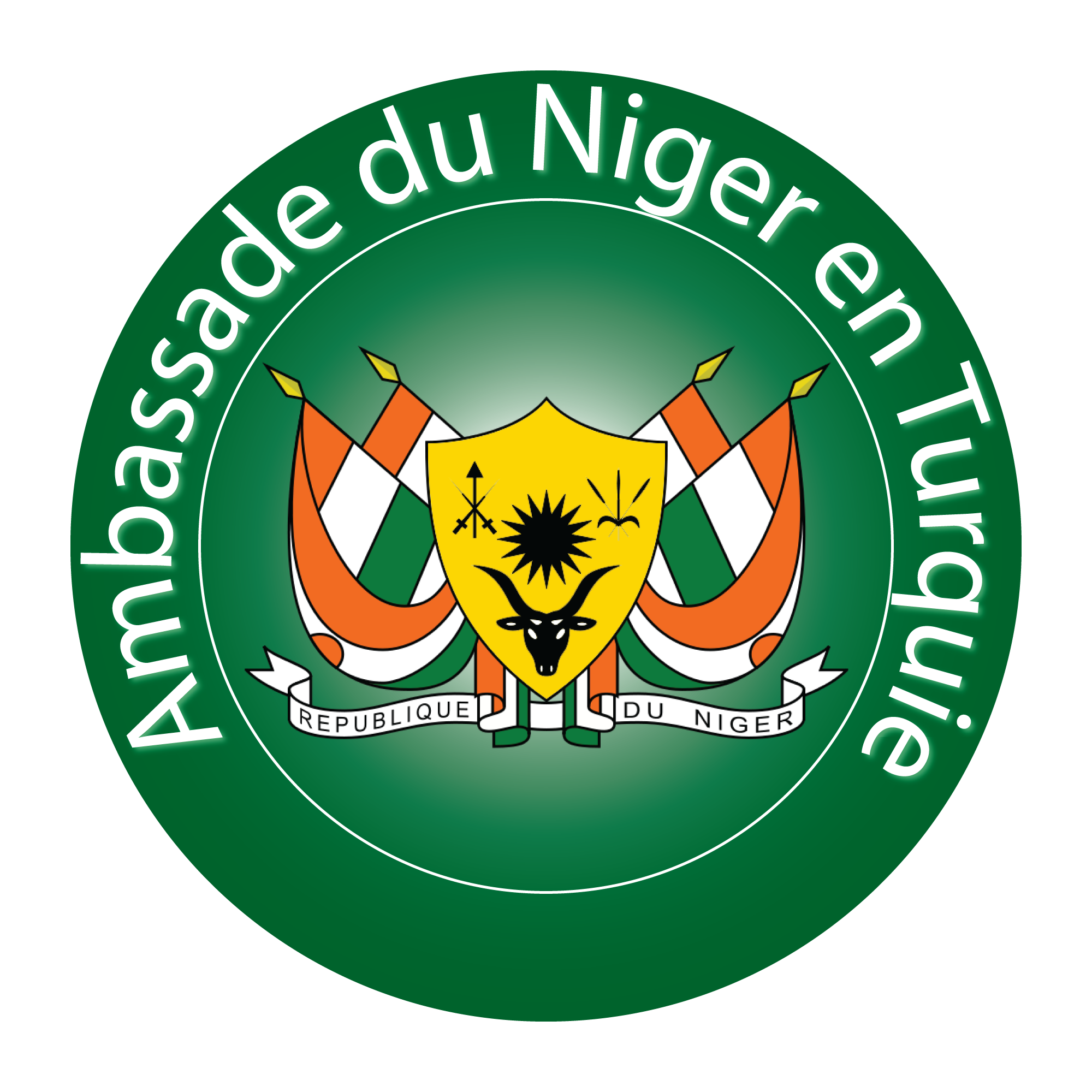 Nijer Büyükelçiliği'nin Logosu